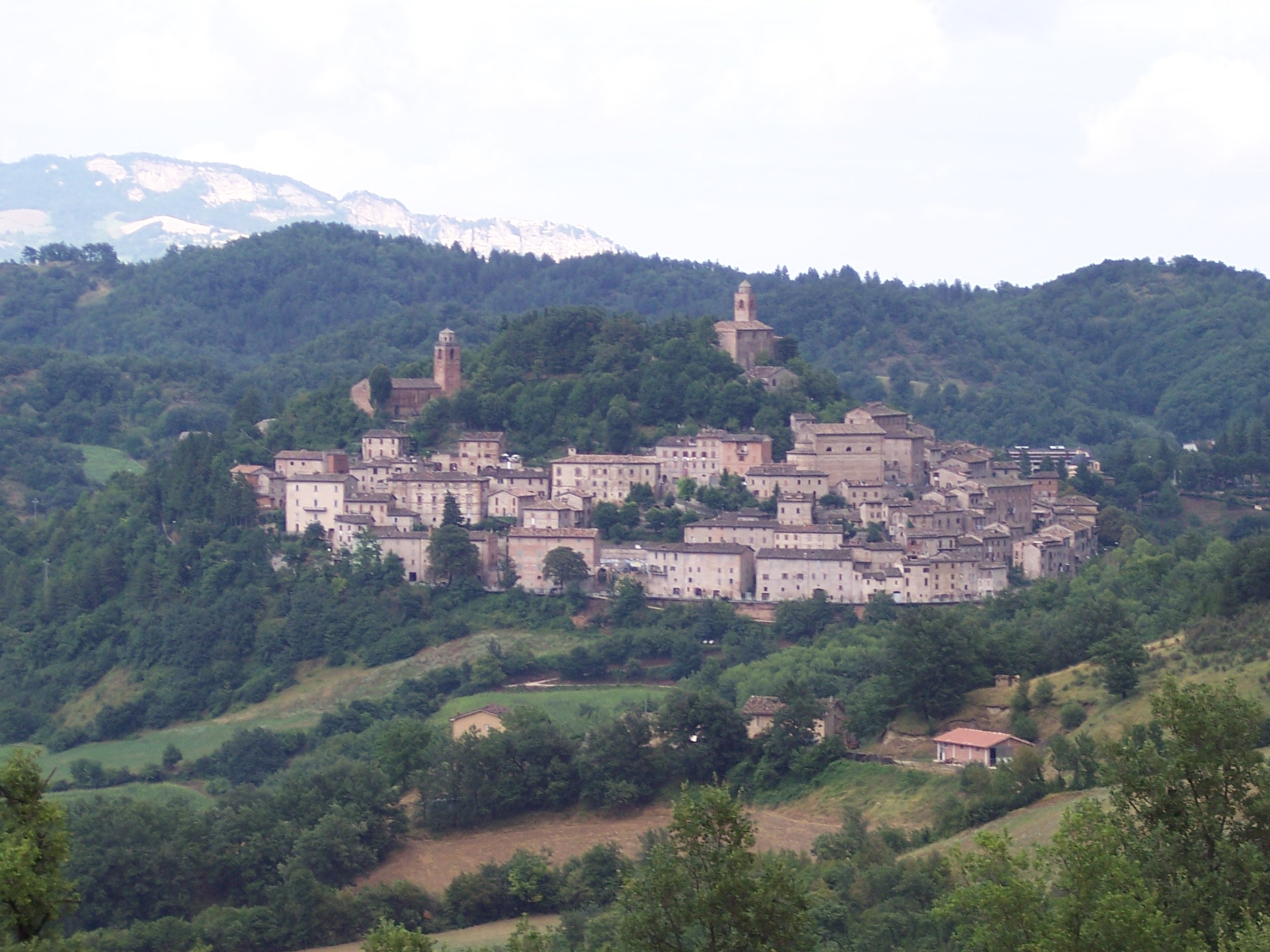 Vista di Montefortino, provincia di Fermo, Fotografia di Giacomo Alessandroni